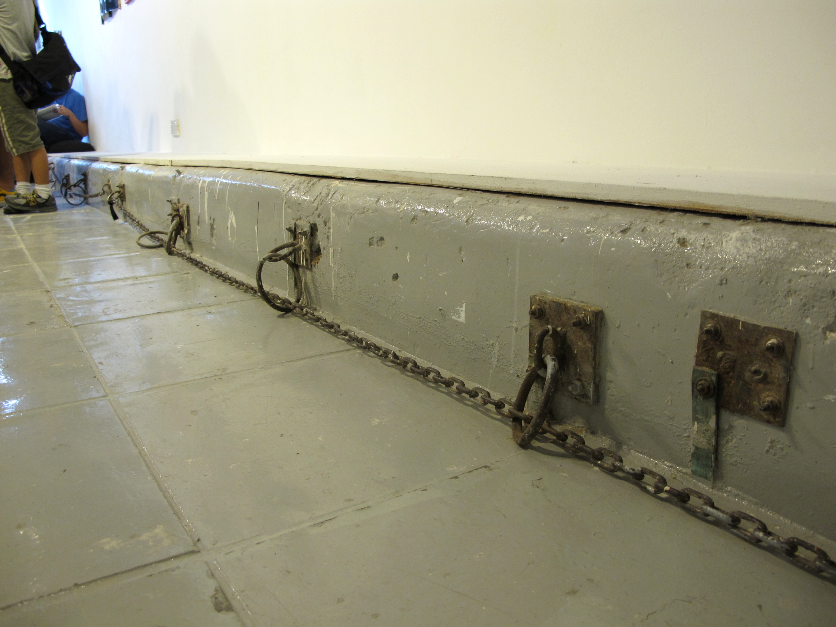 Cattle Depot Artist Village 牛棚藝術村